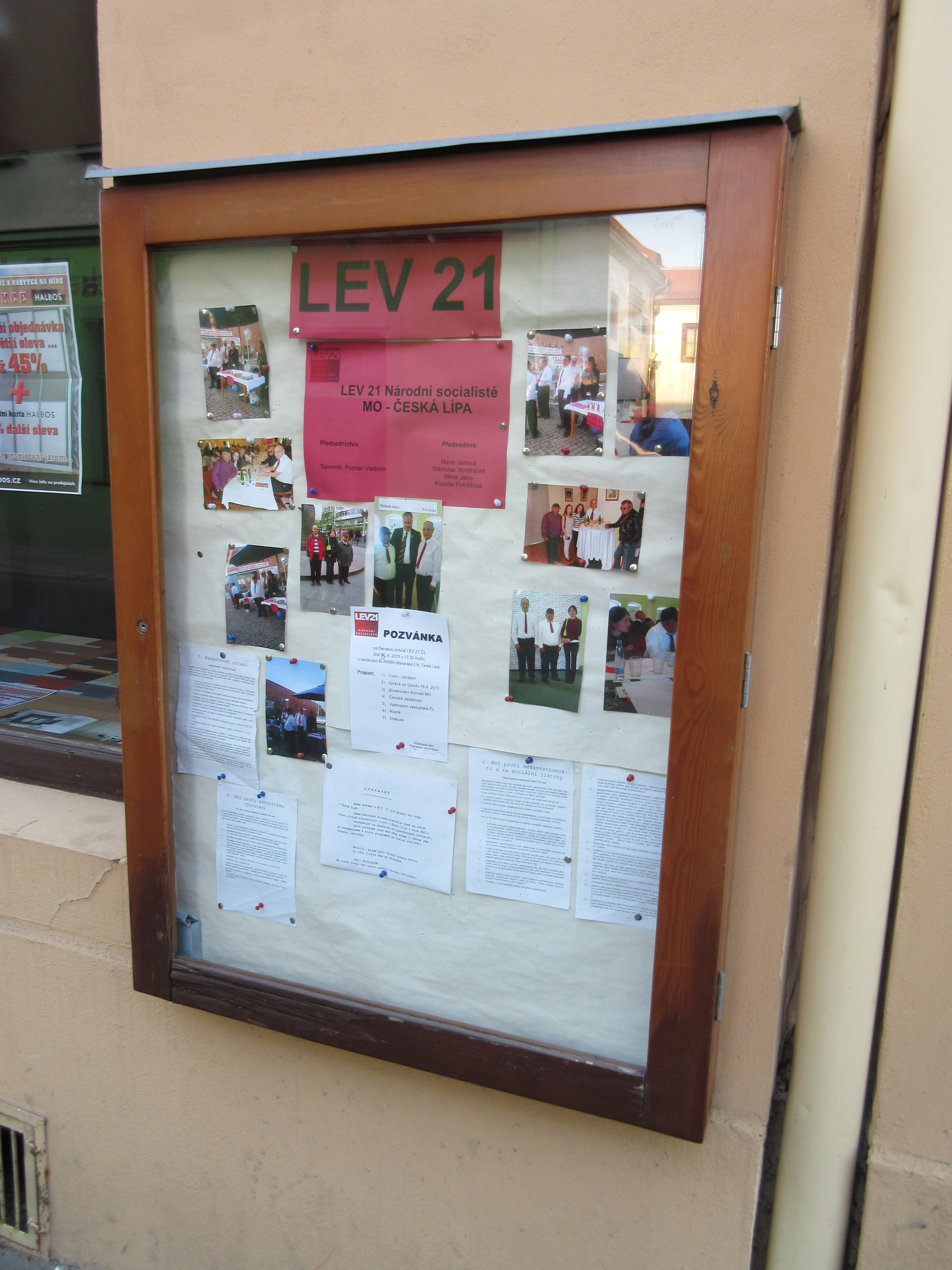 Partajní vývěska v České Lípě